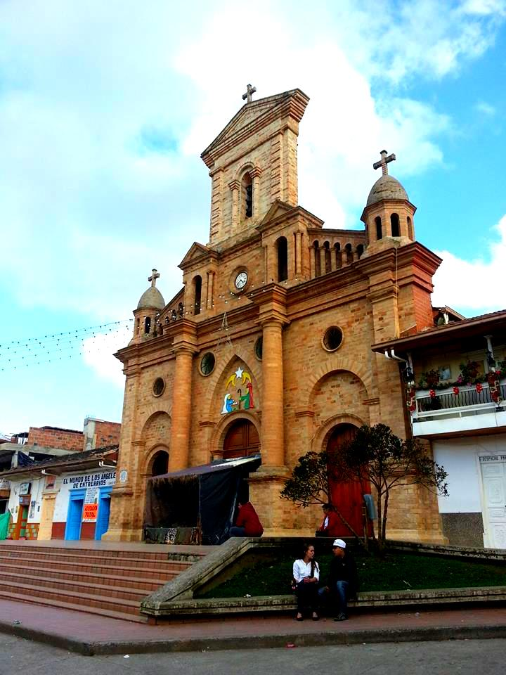 Esta fotografía fue tomada en el municipio colombiano con código 05264.